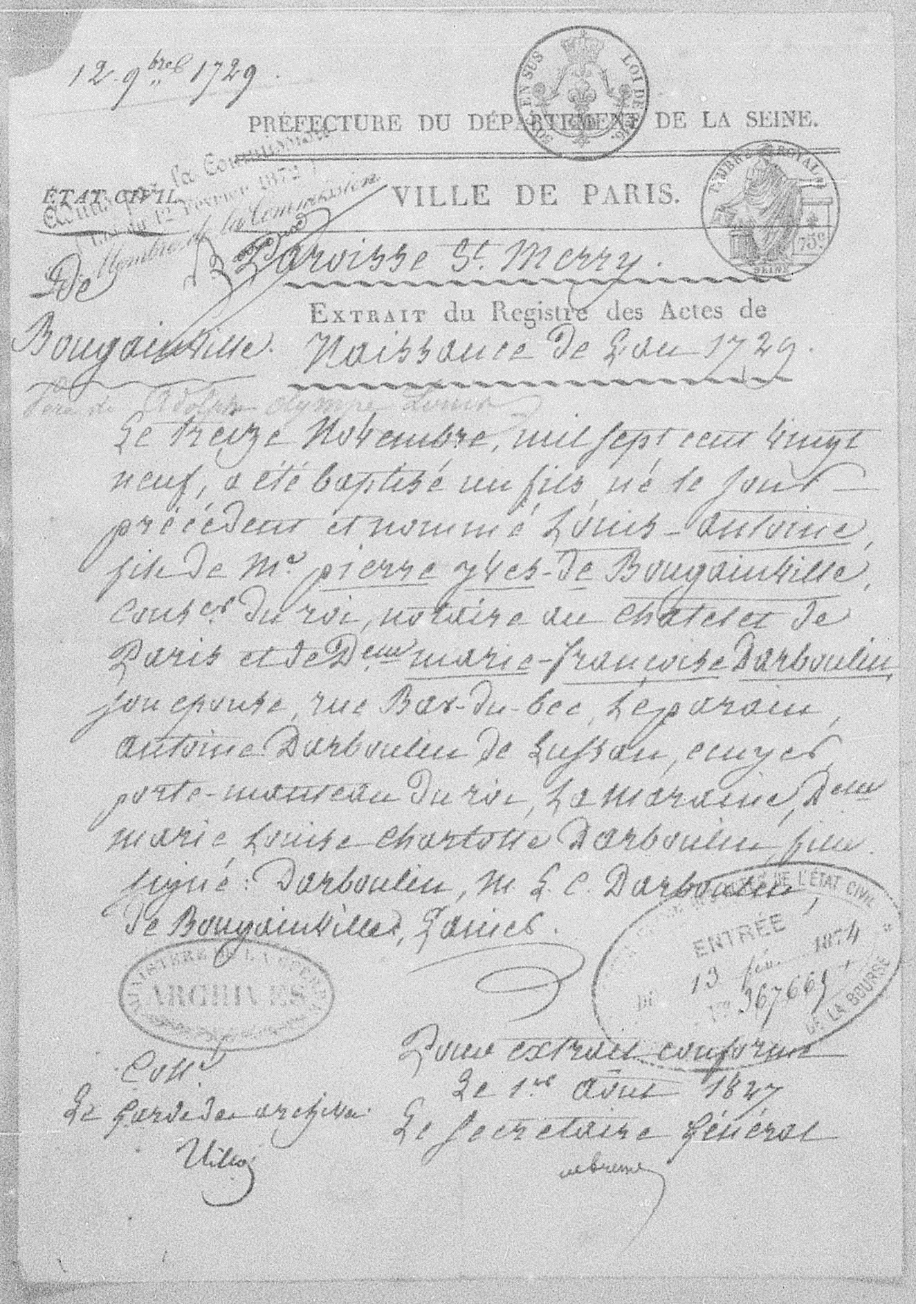 Acte de baptême du navigateur français Louis Antoine de Bougainville le 13 novembre 1729 (né le 12 novembre) en l'église Saint-Merry (Saint-Merri) à Paris.